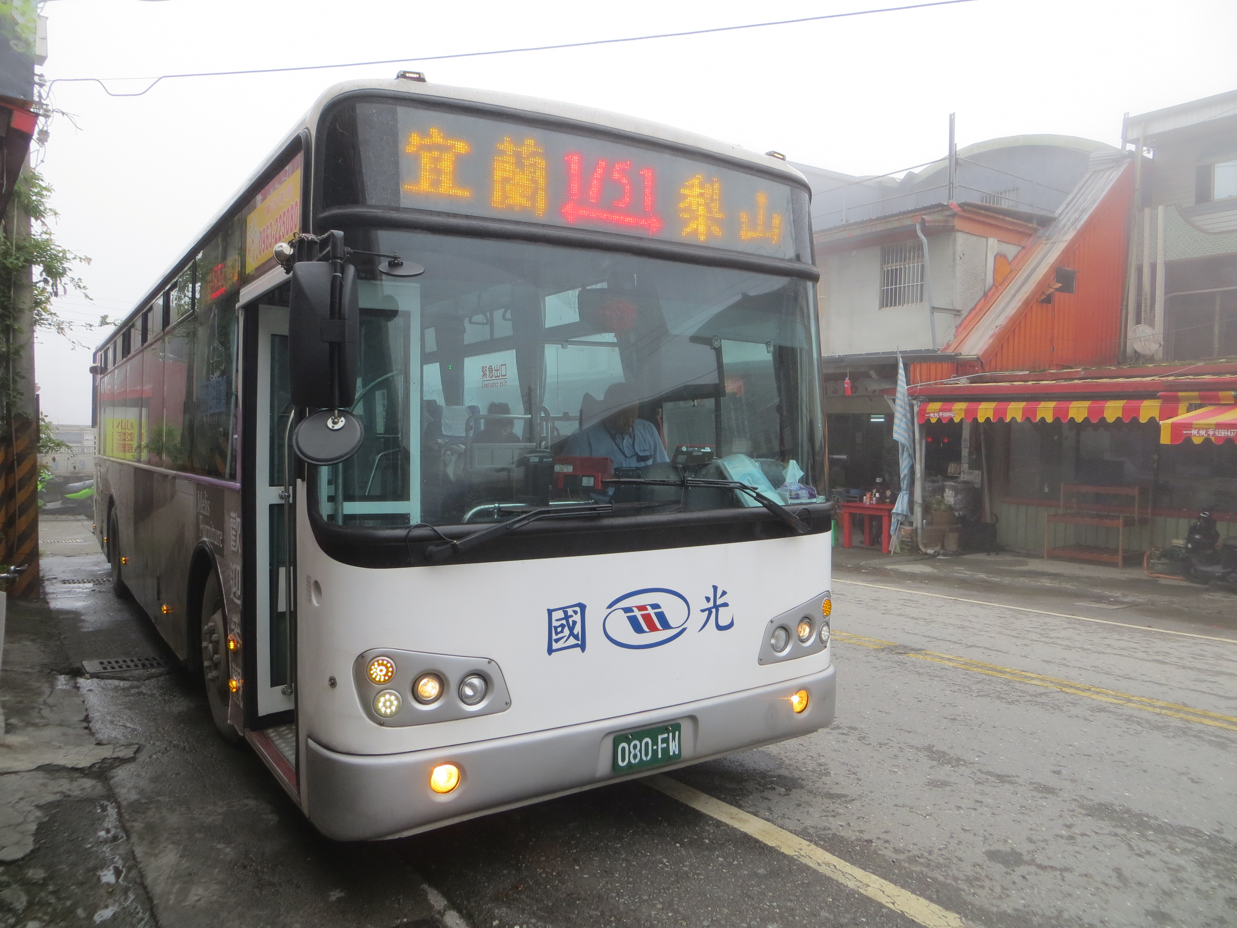 國光客運大宇BC211ML大客車080-FW行駛1751路線，短暫停靠宜蘭縣大同鄉南山村。1751路線自宜蘭至梨山，中途會在大同鄉南山村中停至少十分鐘，供乘客下車便溺、採買產品。2015年10月7日南山村內，此地為台7甲公路中途聚落。